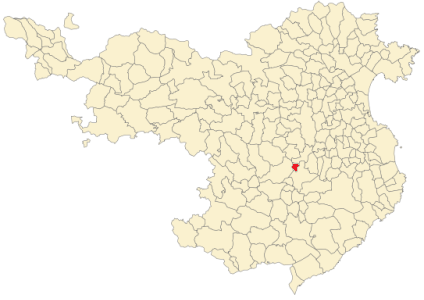 Situación de Sarriá de Ter en la provincia de Gerona.